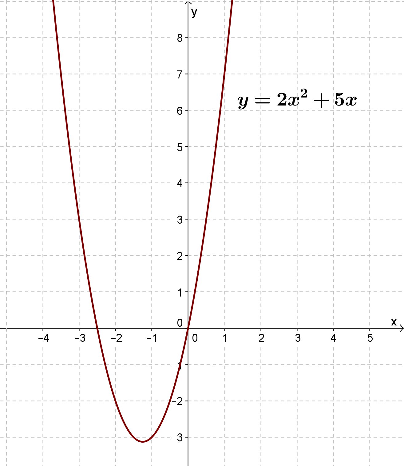 Grafico de uma função de 2º Grau.